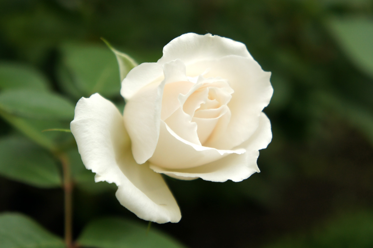 Rose Iceberg バラ アイスバーグ Floribunda rose フロリバンダ Germany ドイツ Kordes 1958